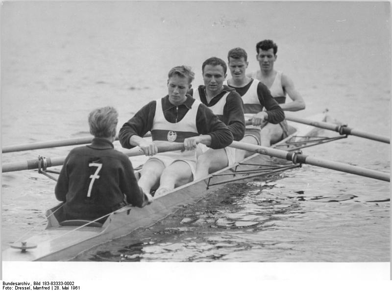 DHfK, Vierer Zentralbild Dressel 28.5.61 Grünauer-Ruderregatta...fand am 28.5.61 auf dem ehemaligen Olympiakurs in Berlin-Grünau statt. UBz: Im Senioren-Vierer mit Steuermann siegte die DHfK mit H. Paatsch, D. Kretschmar, P. Junghans, G. Simon und Steuermann M. Heide.